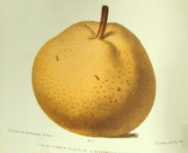 Bergamote Crassane d'Hiver, A. Mas, 1867